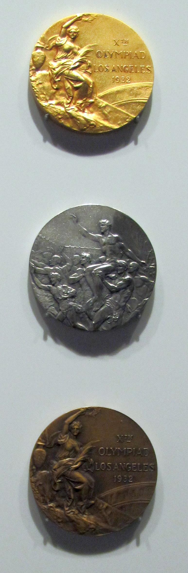 Musée Olympique, Losanna